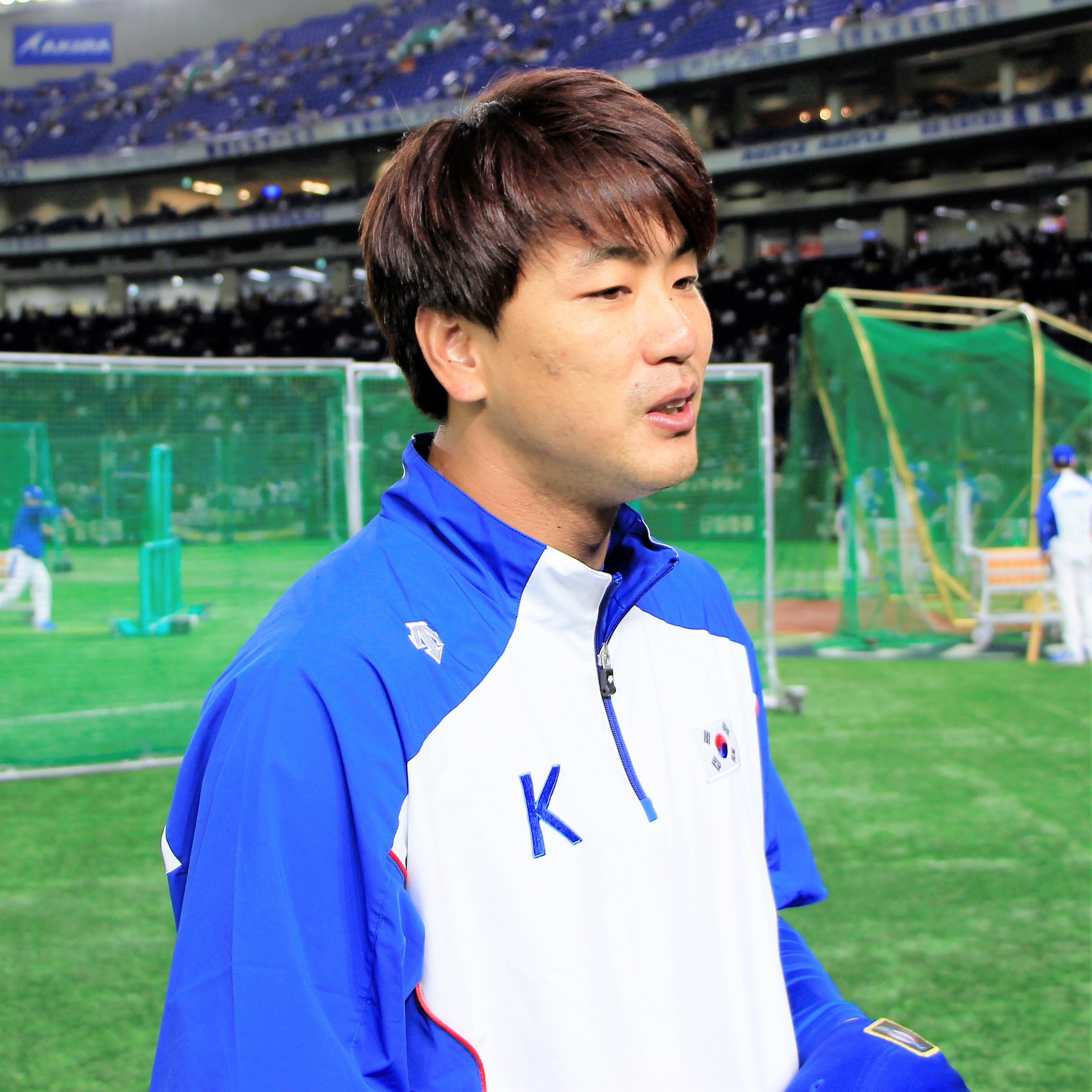 프리미어 12에 국가대표 선수로 출전한 김광현 선수의 모습